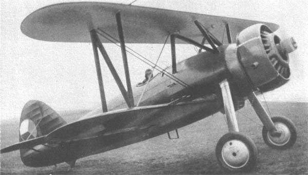 Lietadlo Letov Š-231